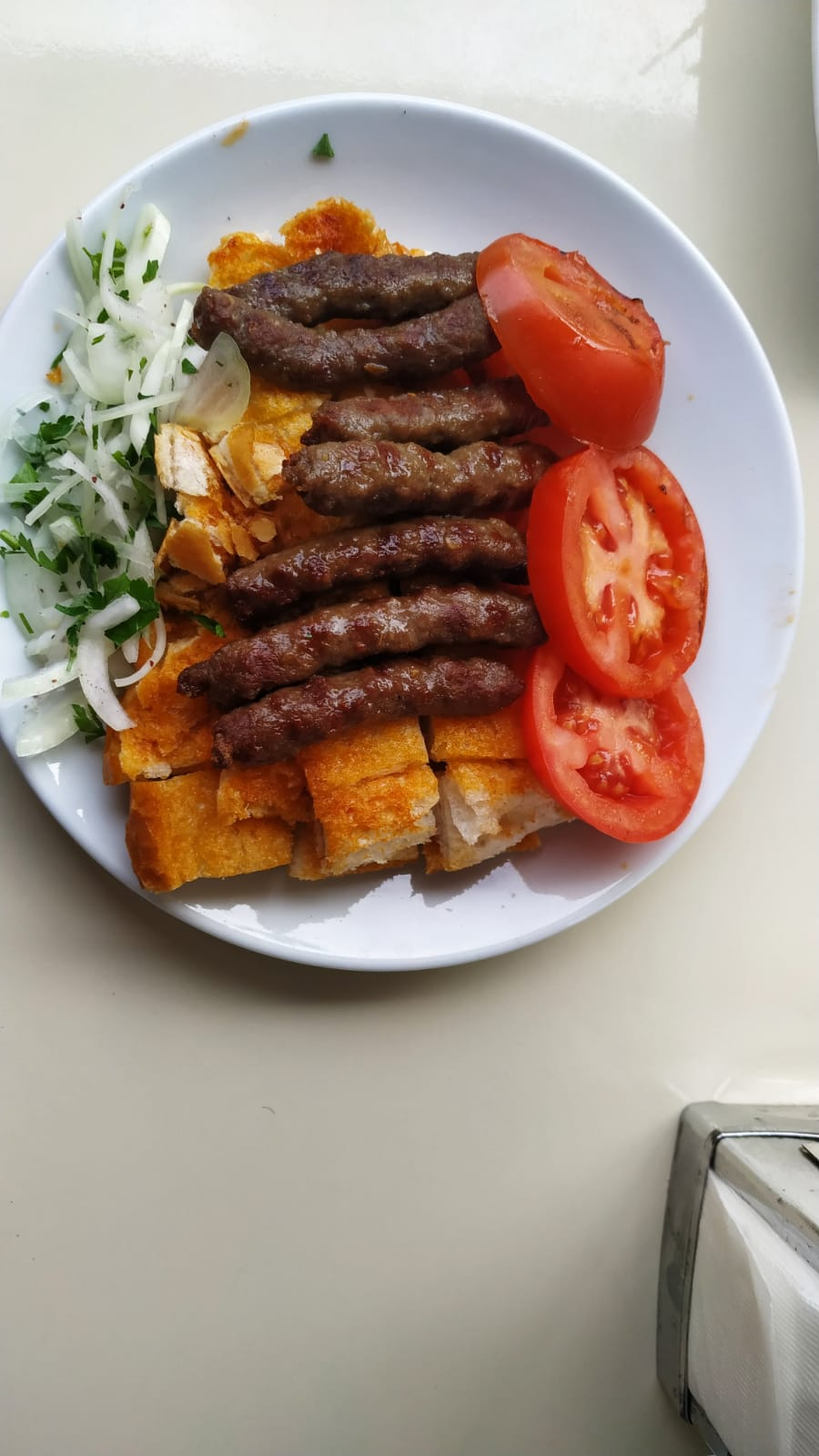 Ödemiş köftesi.